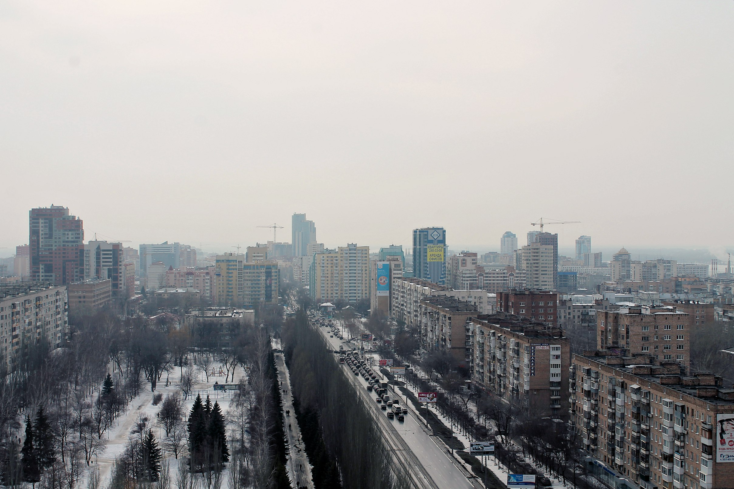 Вид на Проспект Ленина с ул. Осипенко, Самара.